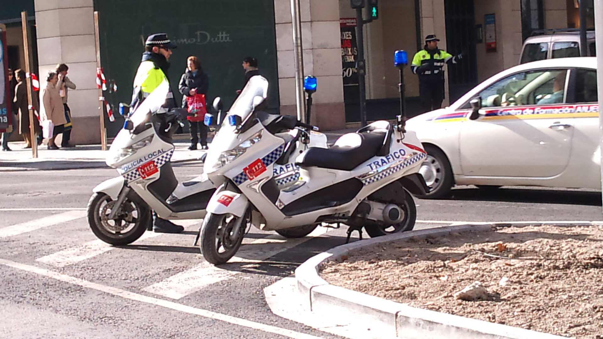 Dos motocicletas de la Policía Local de Jaén.